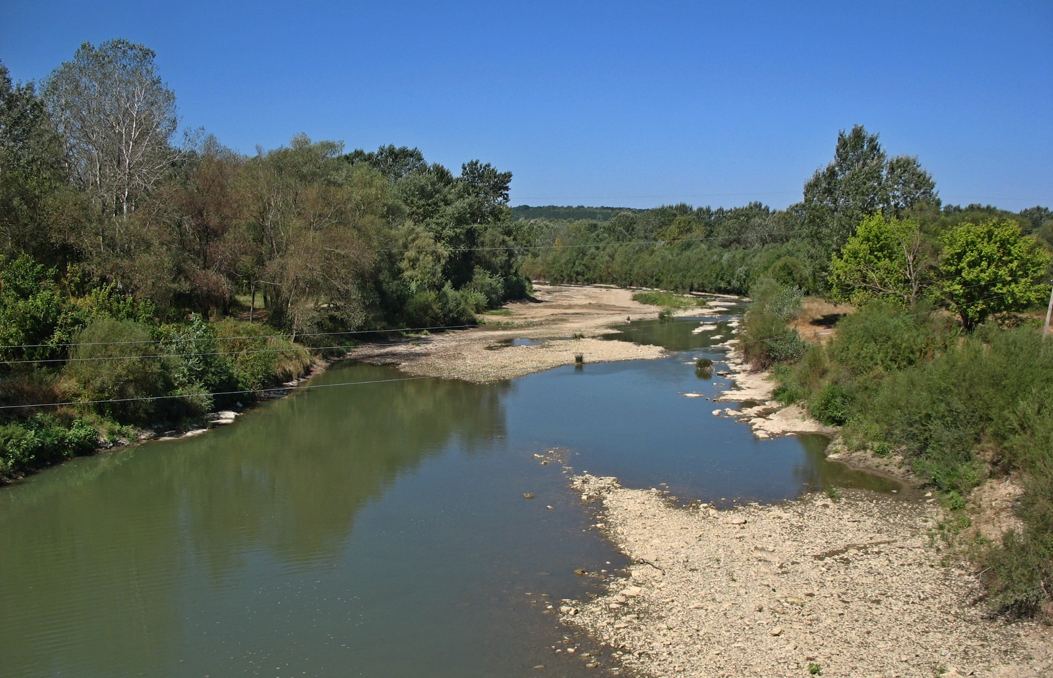 Русло реки Псекупс в черте города Горячий Ключ